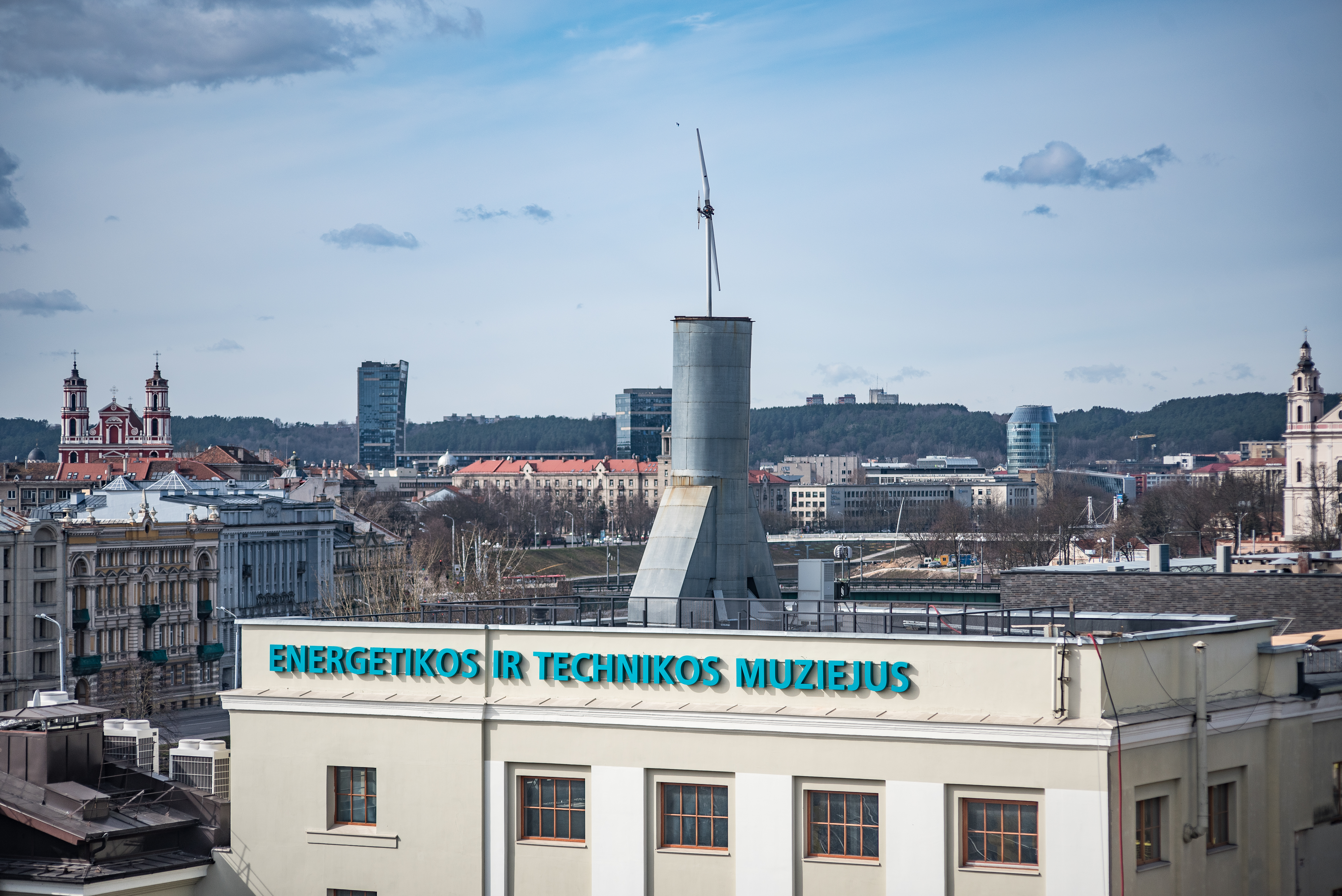 Energetikos ir technikos muziejus yra įsikūręs pirmosios viešosios Vilniaus miesto elektrinės patalpose